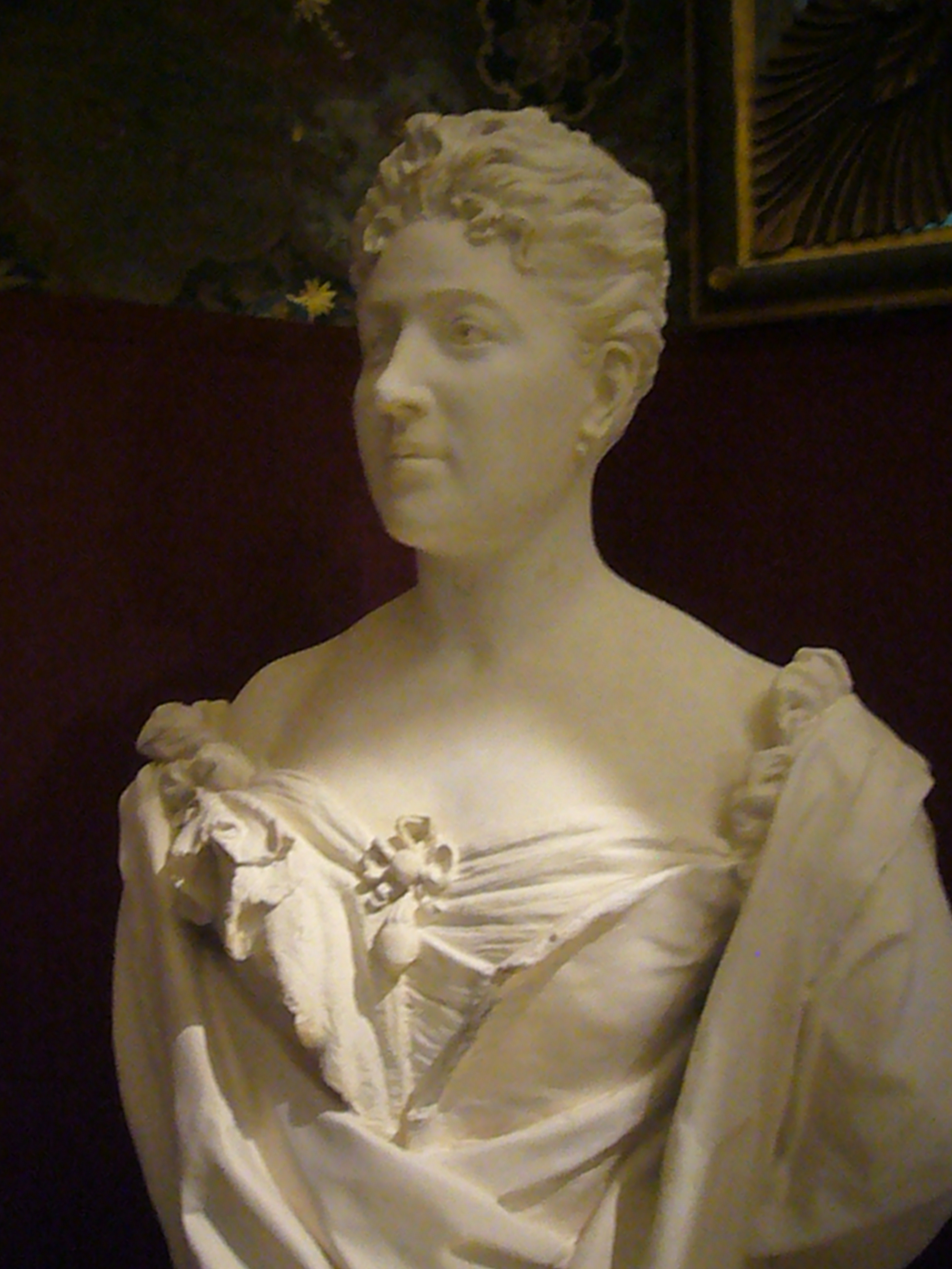 Roma, palazzo Brancaccio, busto della principessa (Gai 1909)